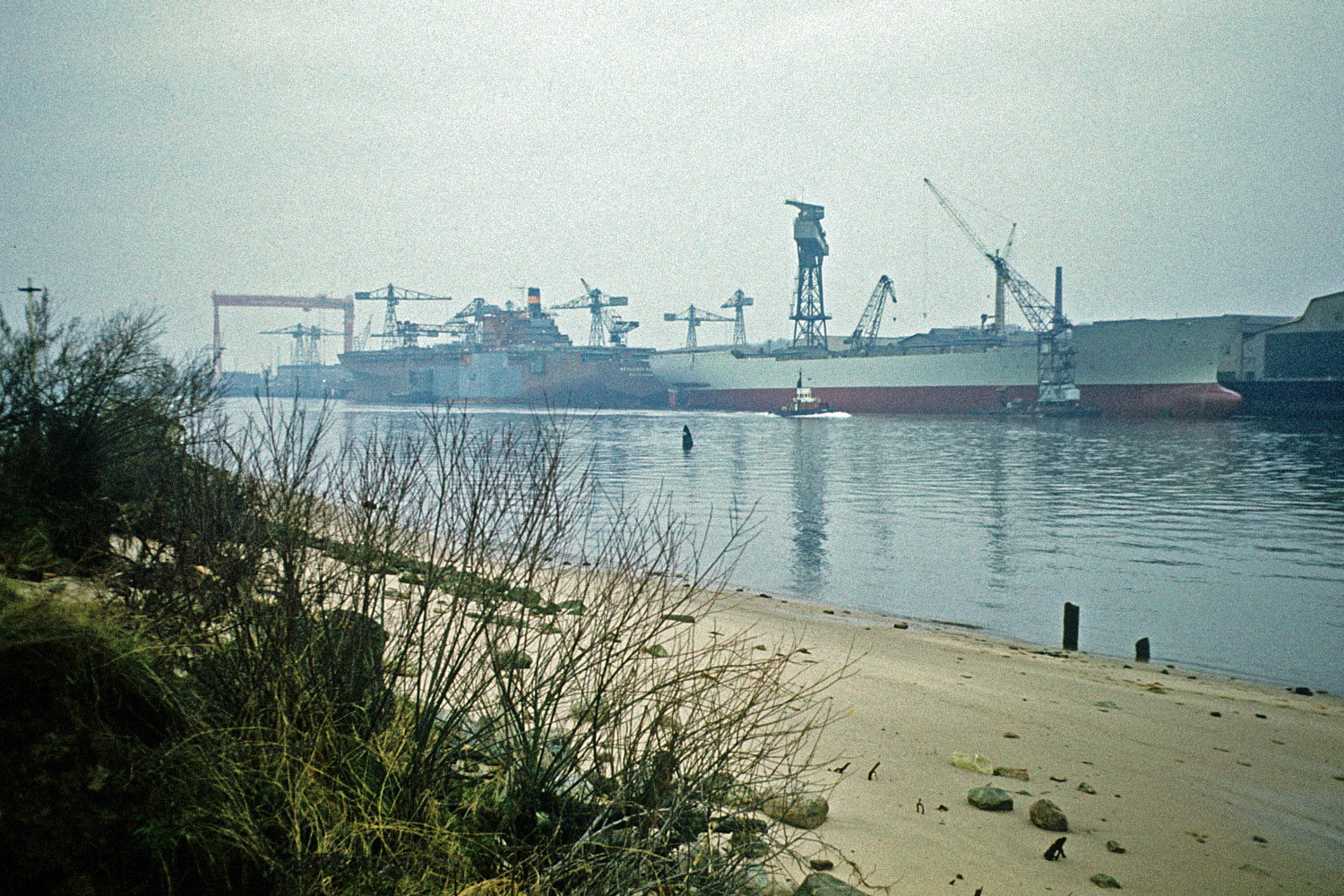 Ausrüstungspier der Bremer Vulkan Werft